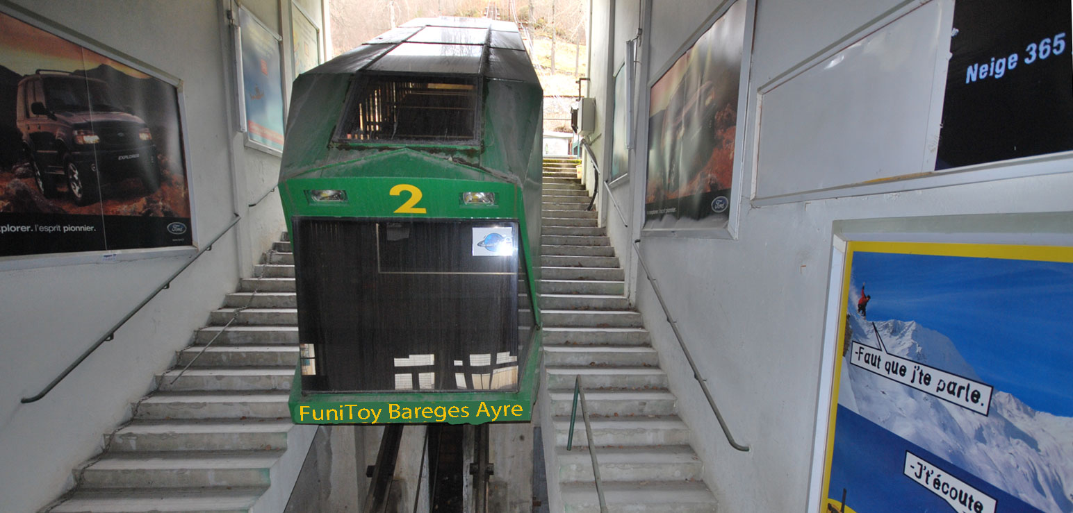 Le Funiculaire Bareges-Ayre dans la Gare inferieure